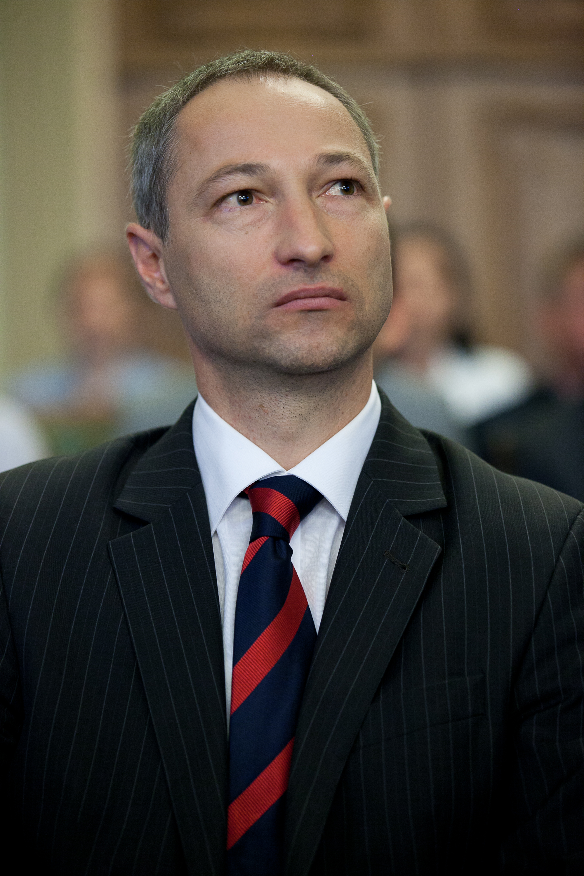 Jānis Bordāns